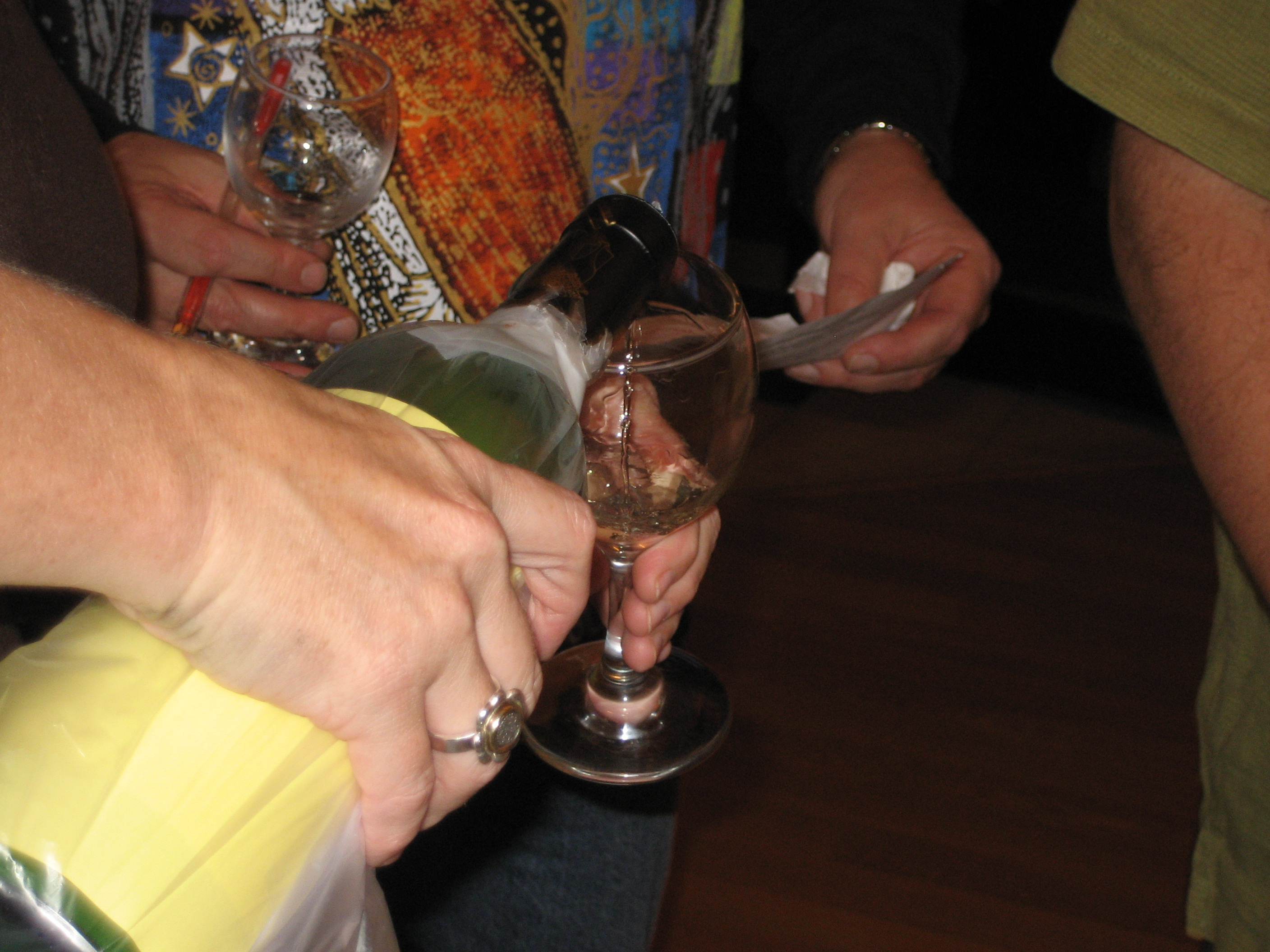 Service du vin blanc